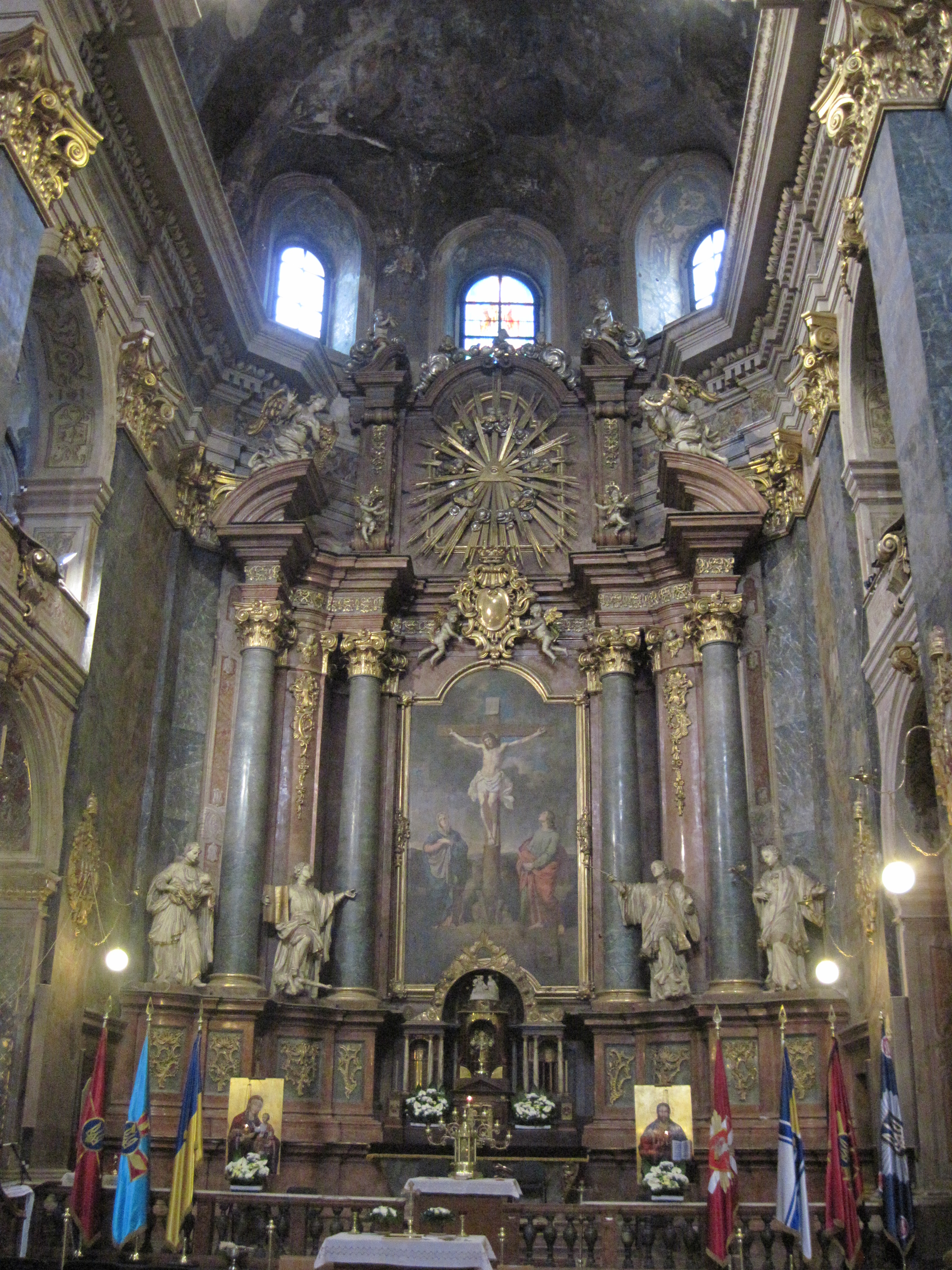 Lwów - kościół pw. św. Piotra i Pawła